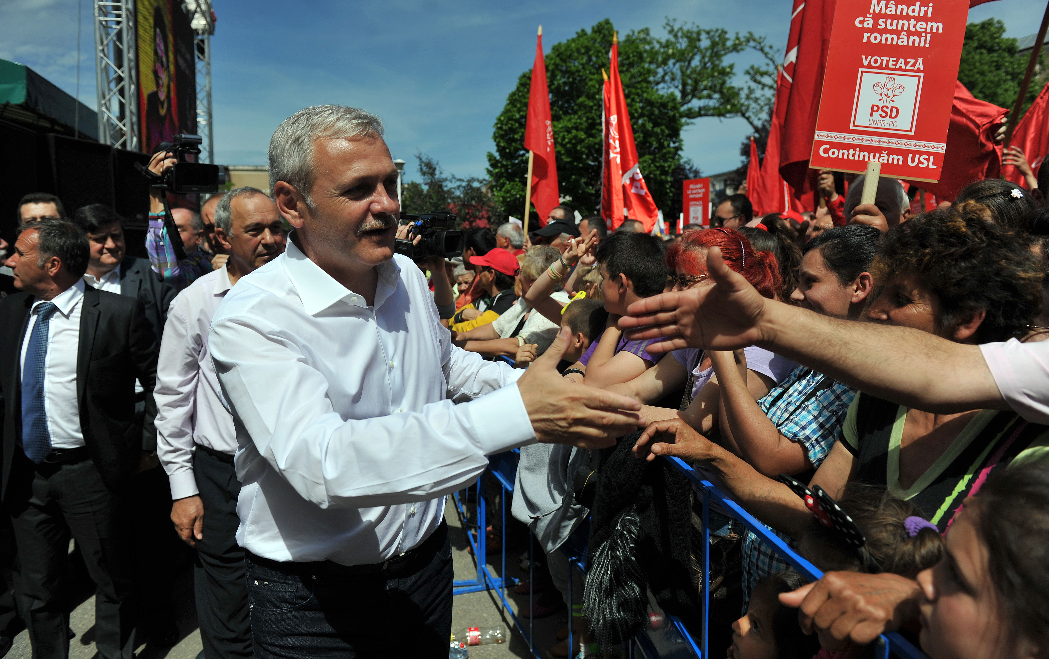 1. Mitingul Electoral al Aliantei PSD-UNPR-PC, Calan - 11.05 (6)